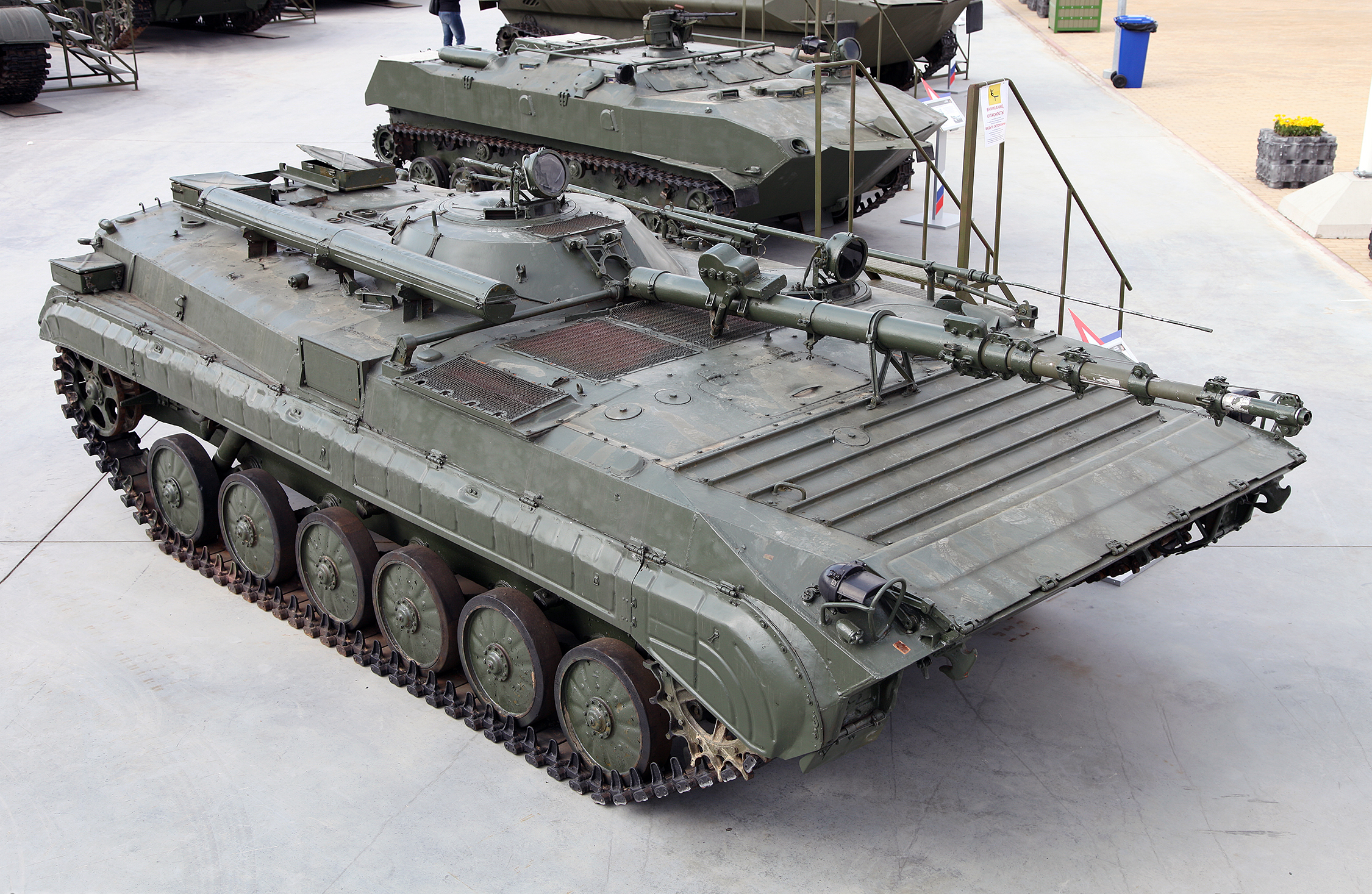 БМП-1КШ (BMP-1KSh)